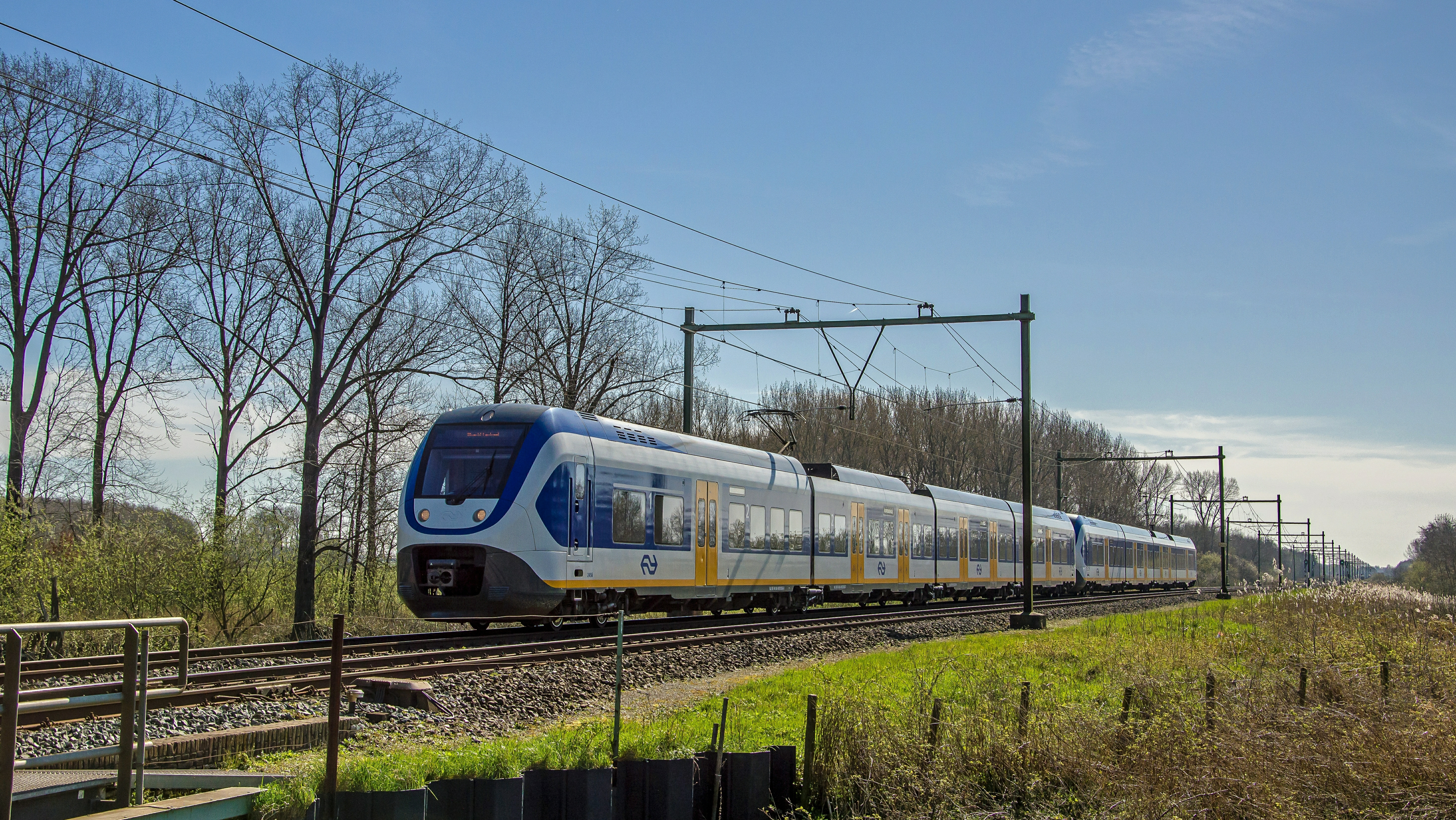 Het SLT duo 2456 en 2438 is onderweg als Sprinter Breda - Utrecht. De trein komt hier Culemborg binnen rijden.